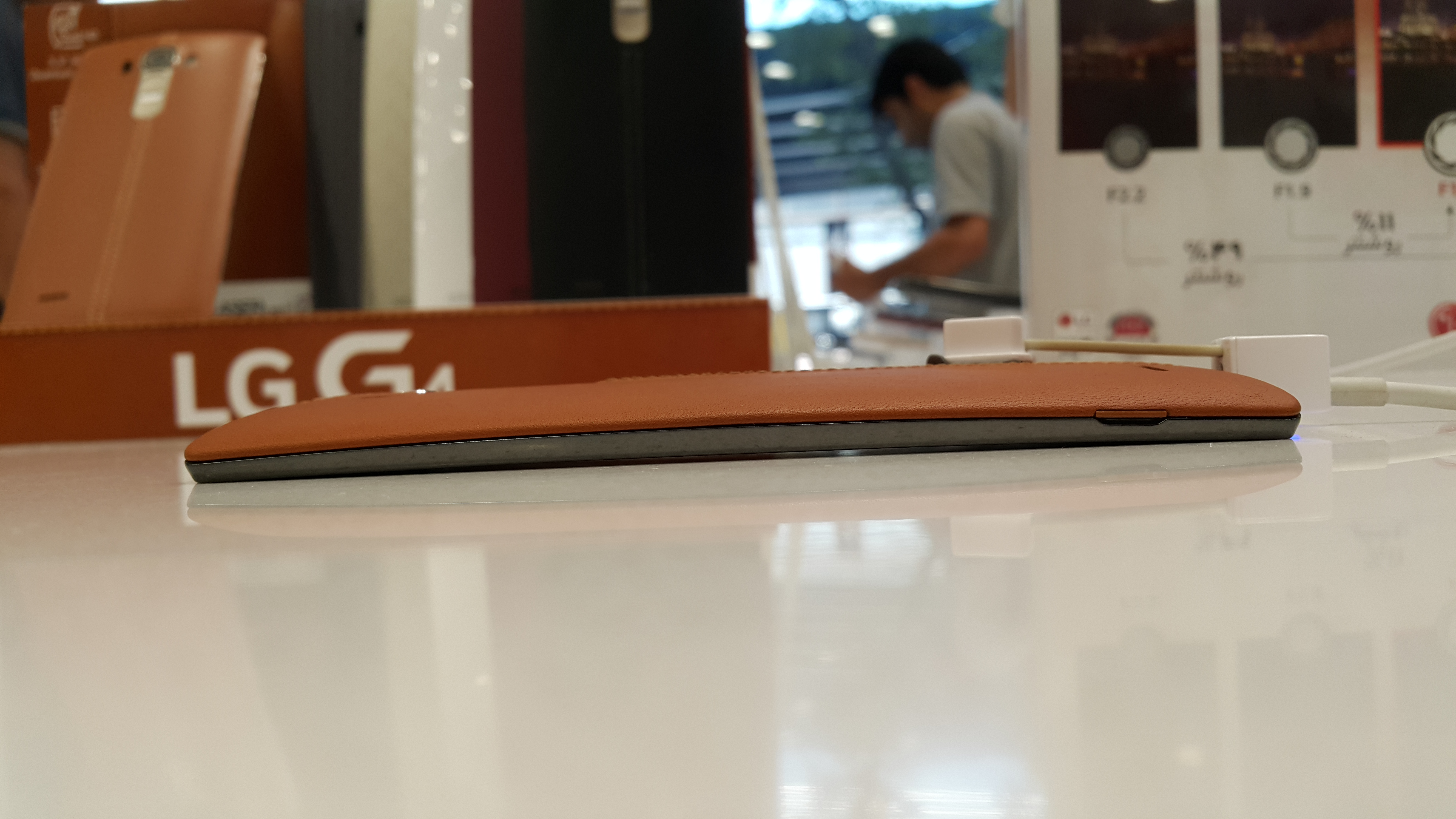 ضخامت ال جی جی 4